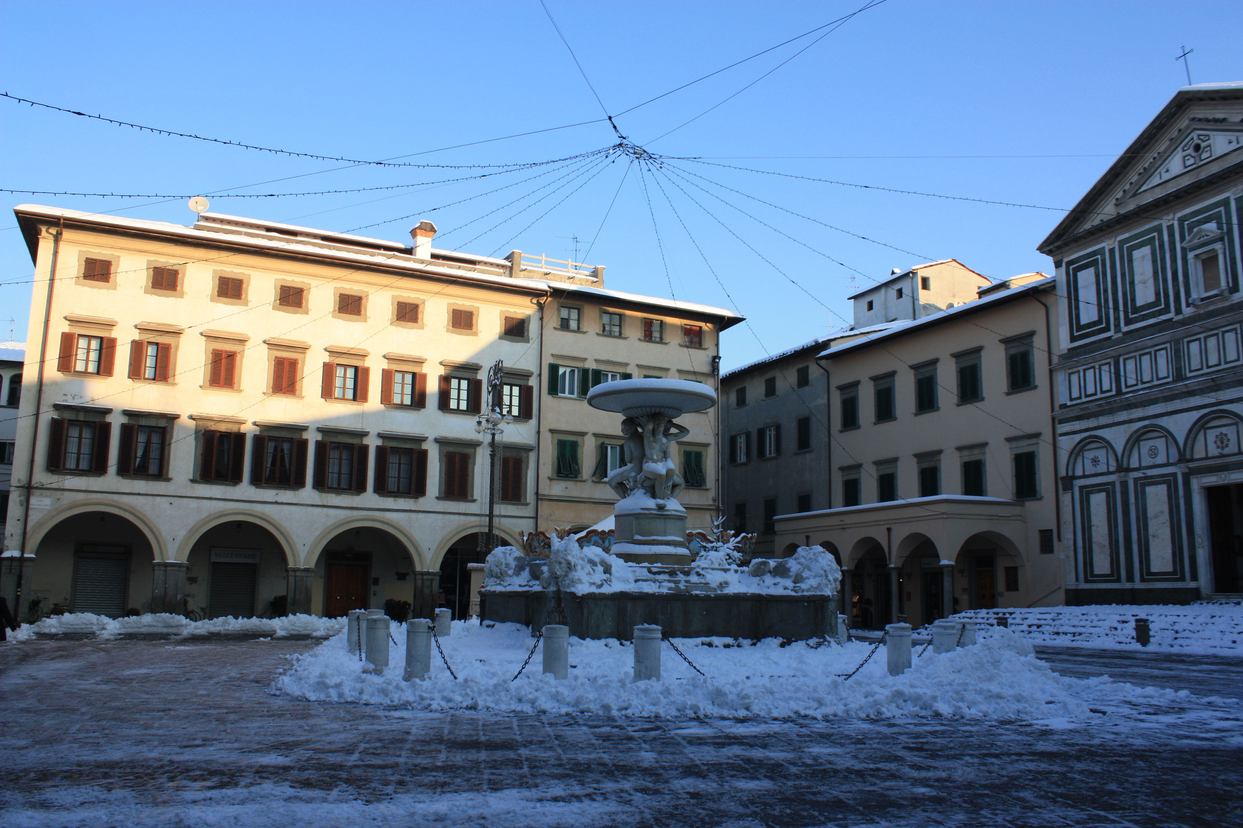 Una foto raffigurante piazza Farinata degli Uberti dopo la grande nevicata del 17 dicembre 2010